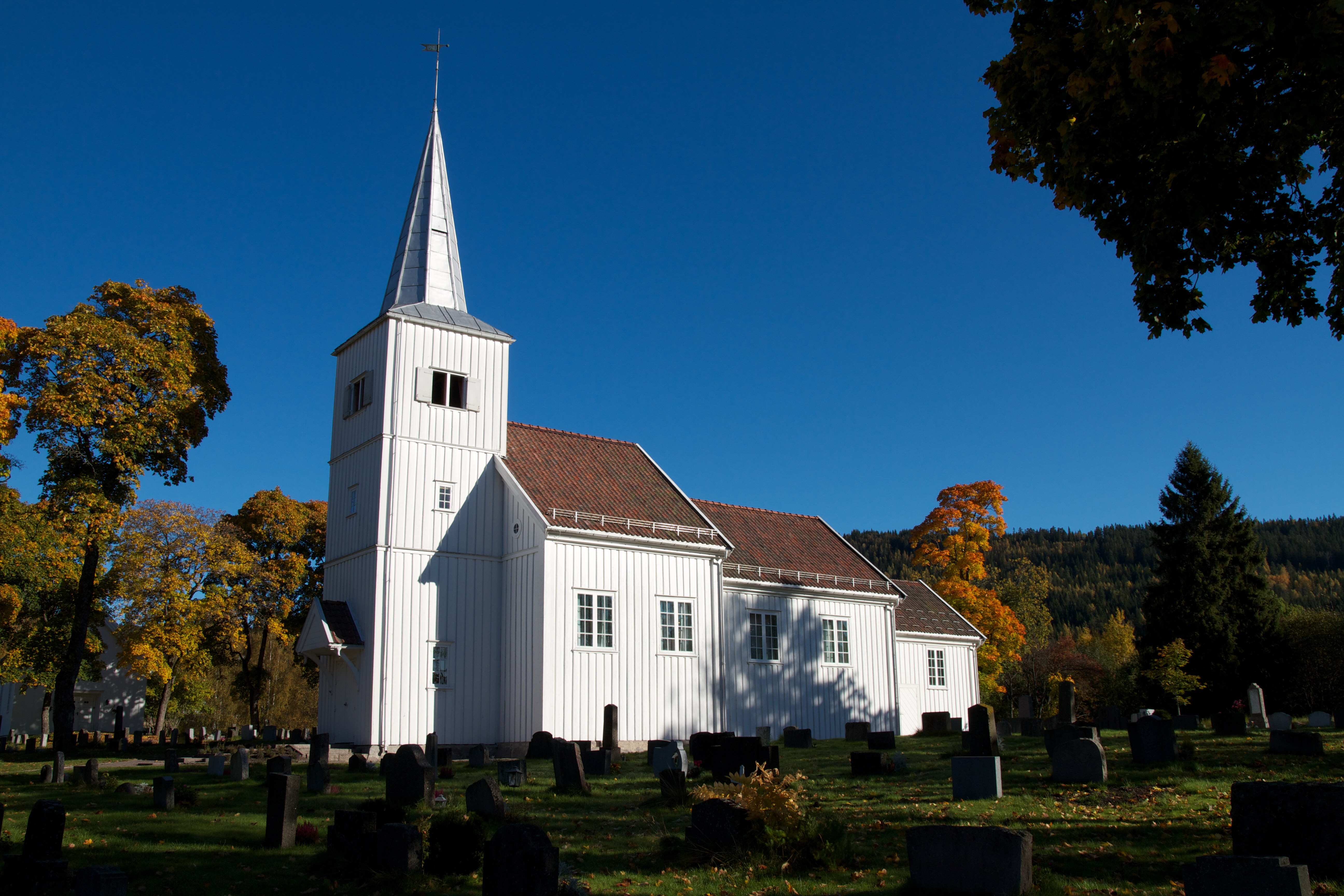 Hakadal kirke.